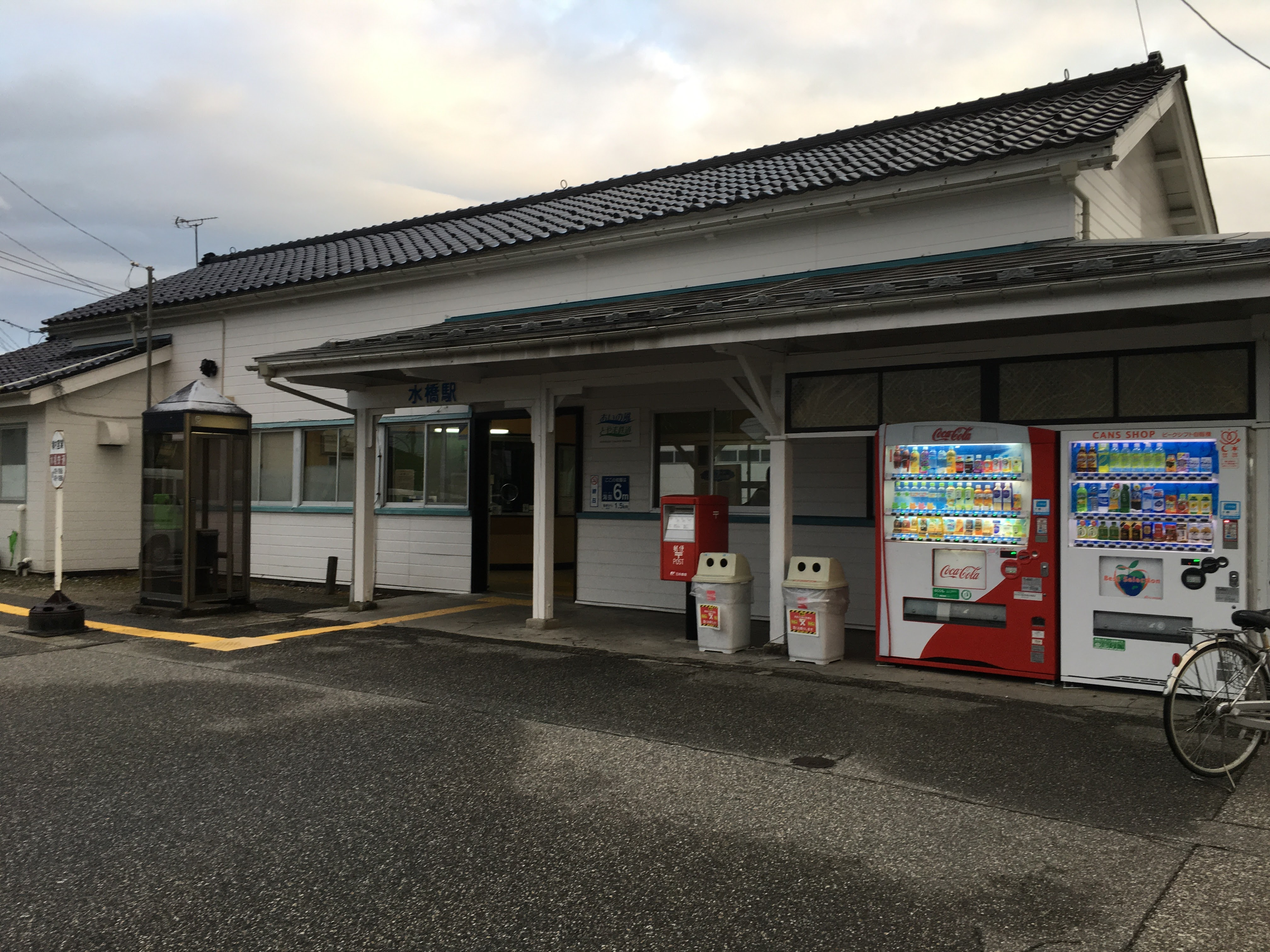 水橋駅駅舎